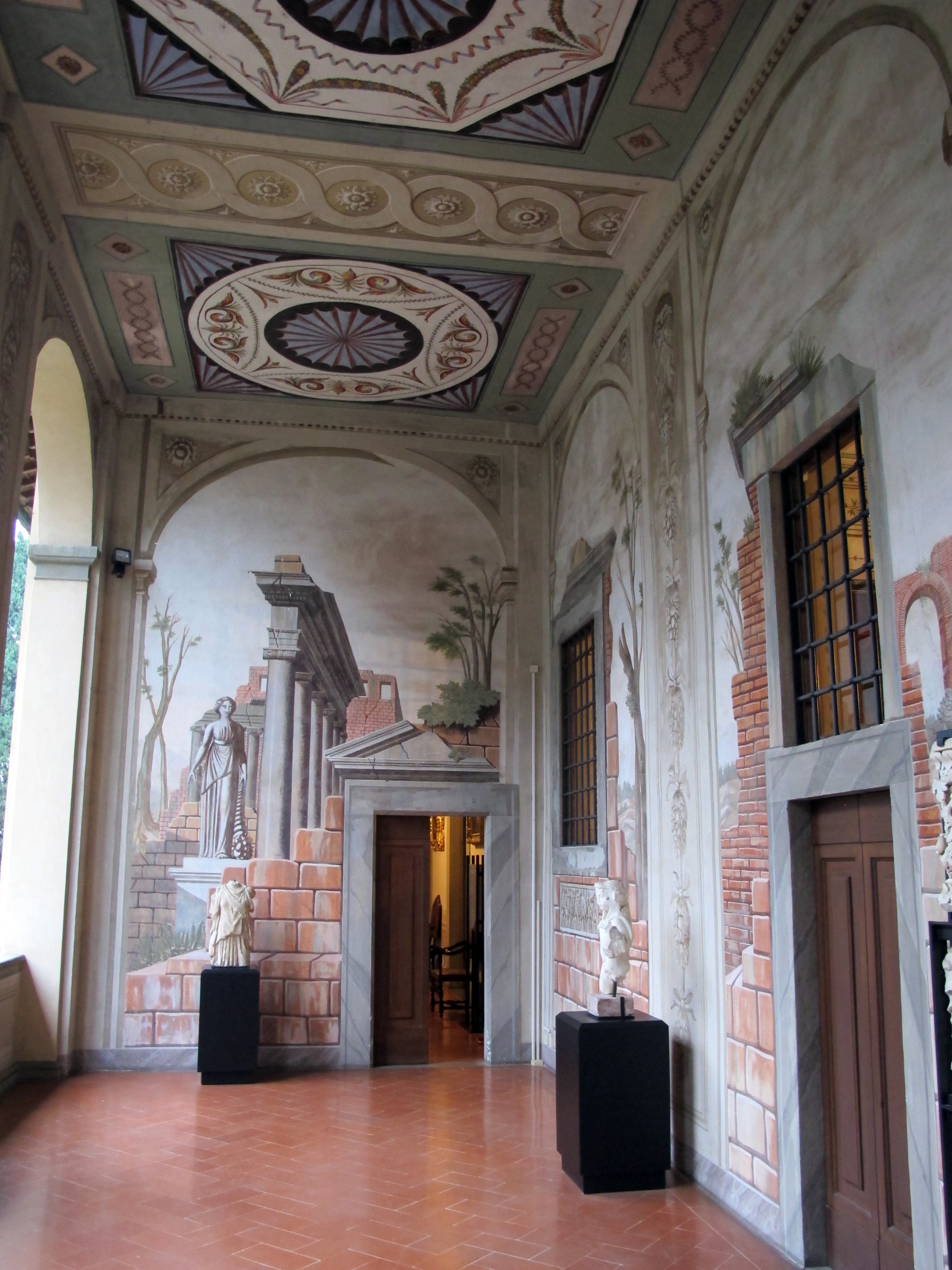 Villa di carreto guidi, loggia dx